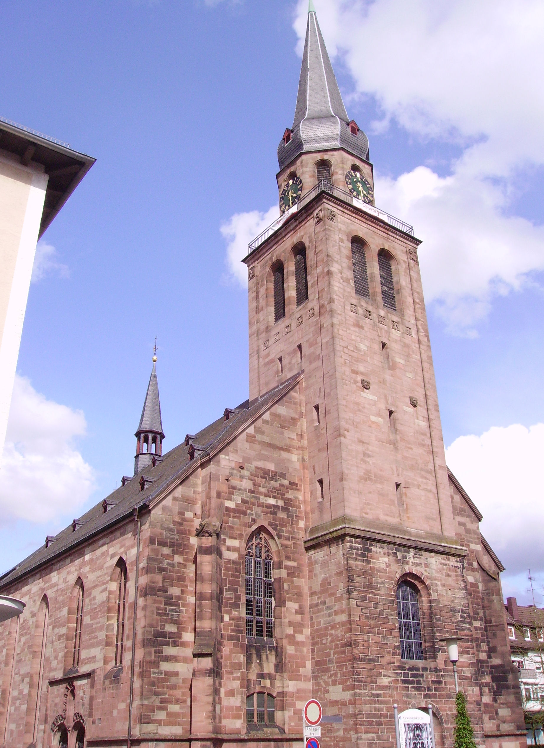 church in Zweibrücken, Germany